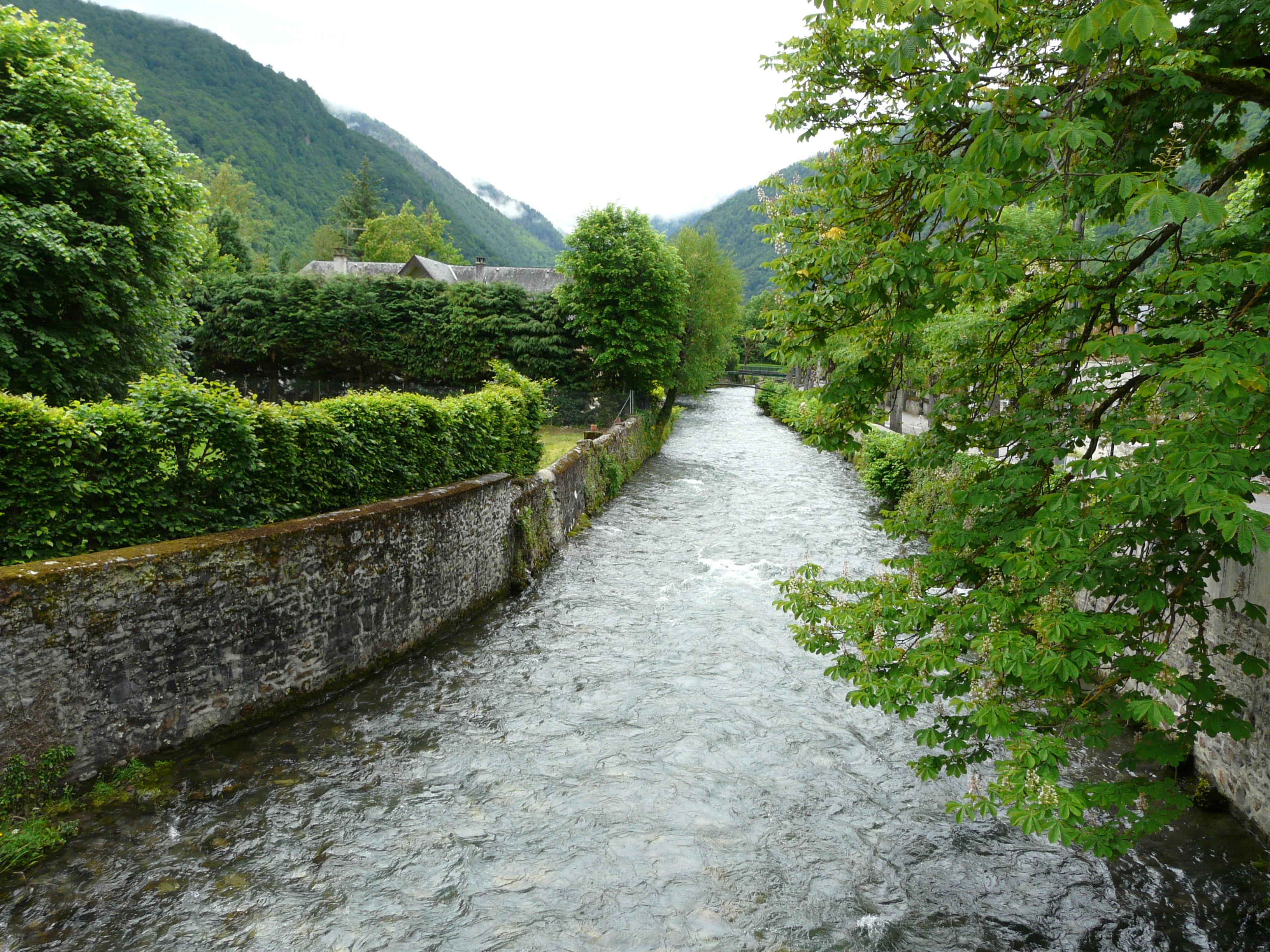 La Pique en amont du pont de la route départementale 27c en limites de Montauban-de-Luchon (à gauche) et Bagnères-de-Luchon (à droite), Haute-Garonne, France.